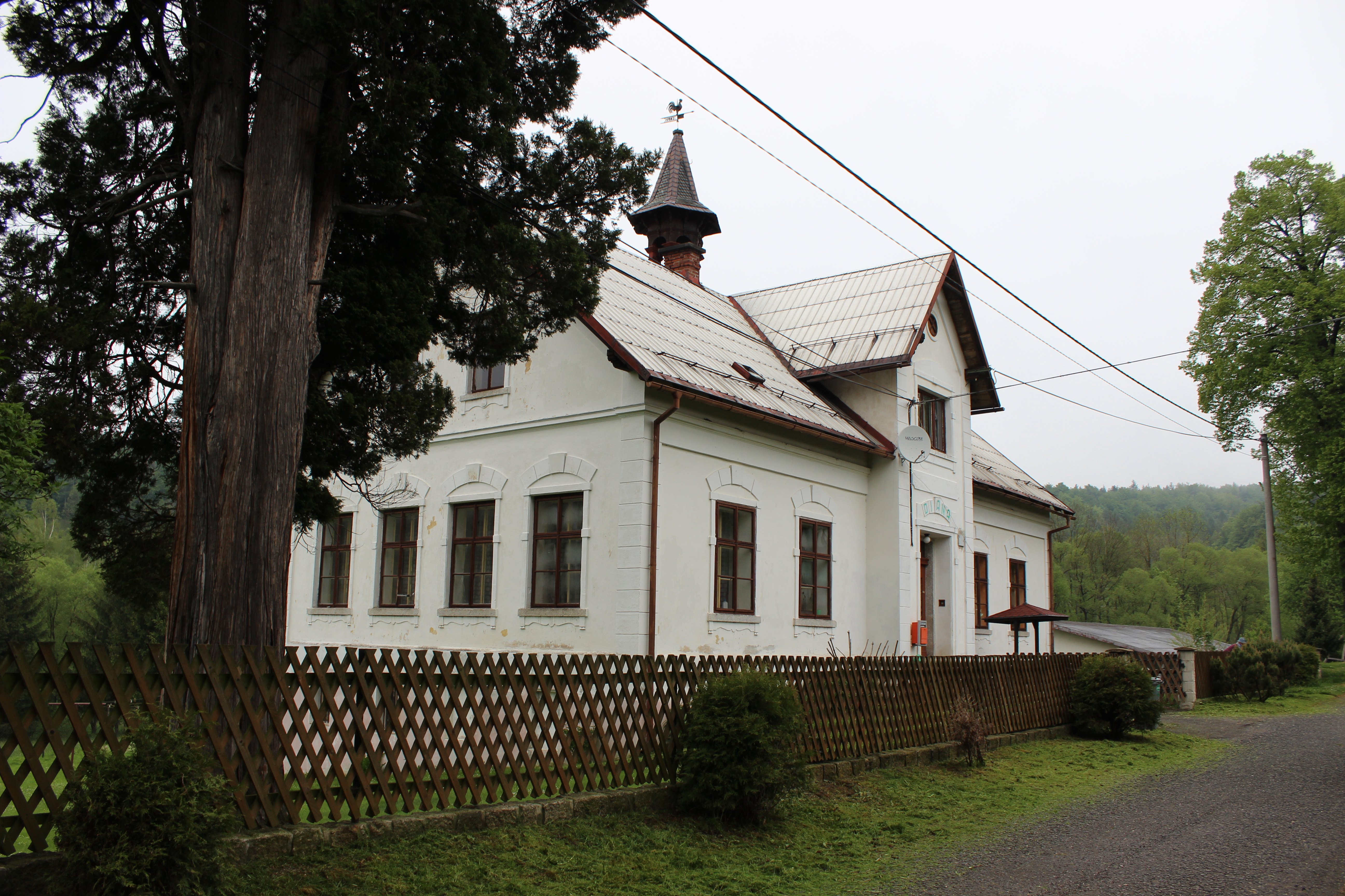 Dům číslo popisné 412 v Pekle, části Raspenavy (pohled od jihu).